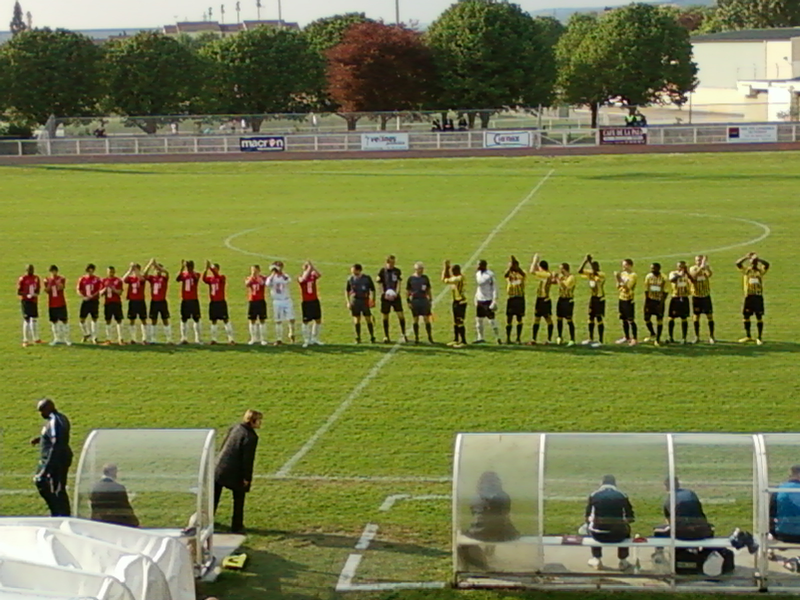 Présentation des équipes lors du match AS Poissy - Lille B du 16 avril 2011